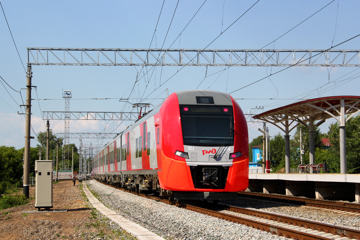 ЭС1-018 на станции Вахитово, Казань